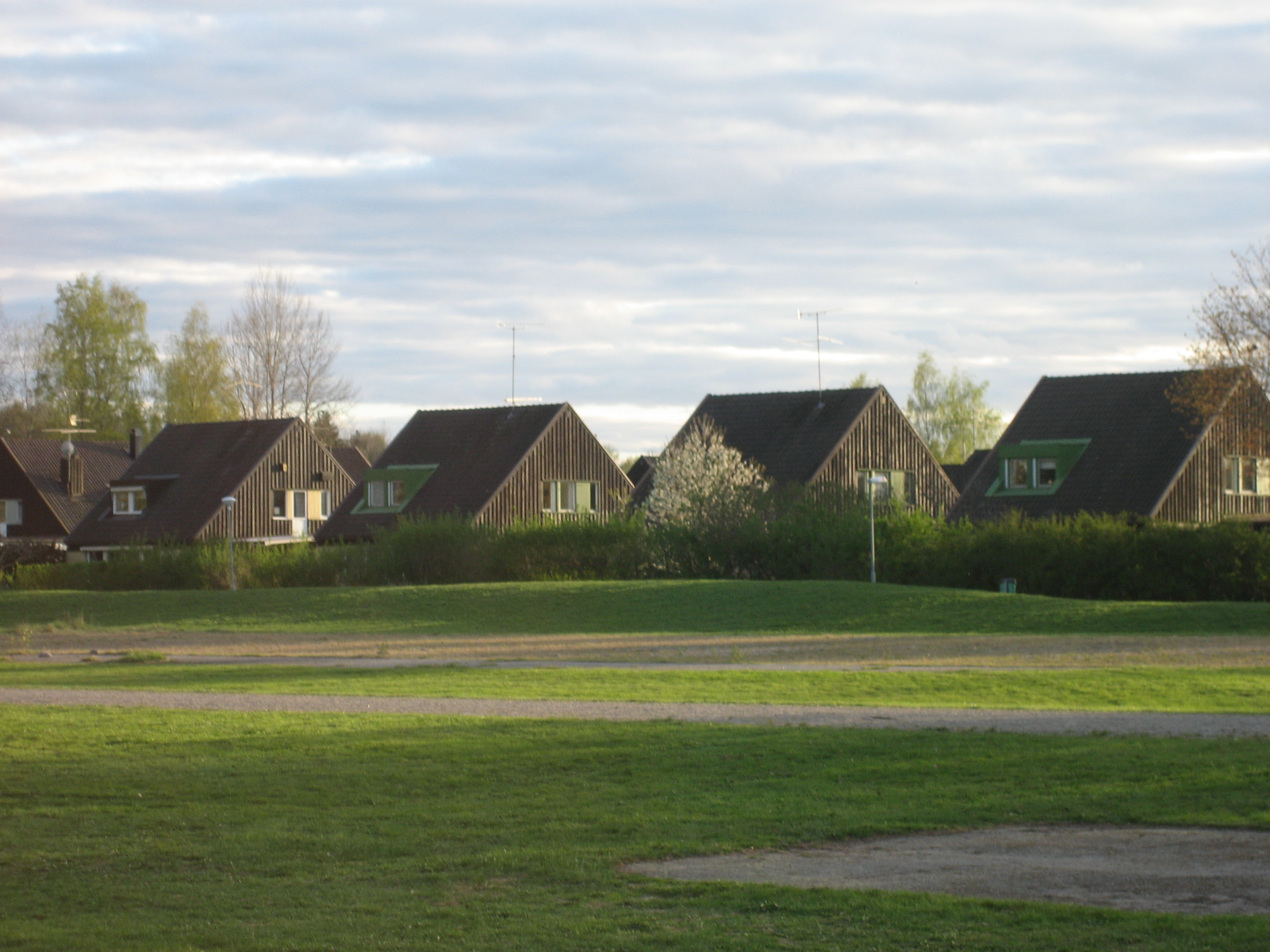 Houses in Adolfsberg, Örebro, Sweden